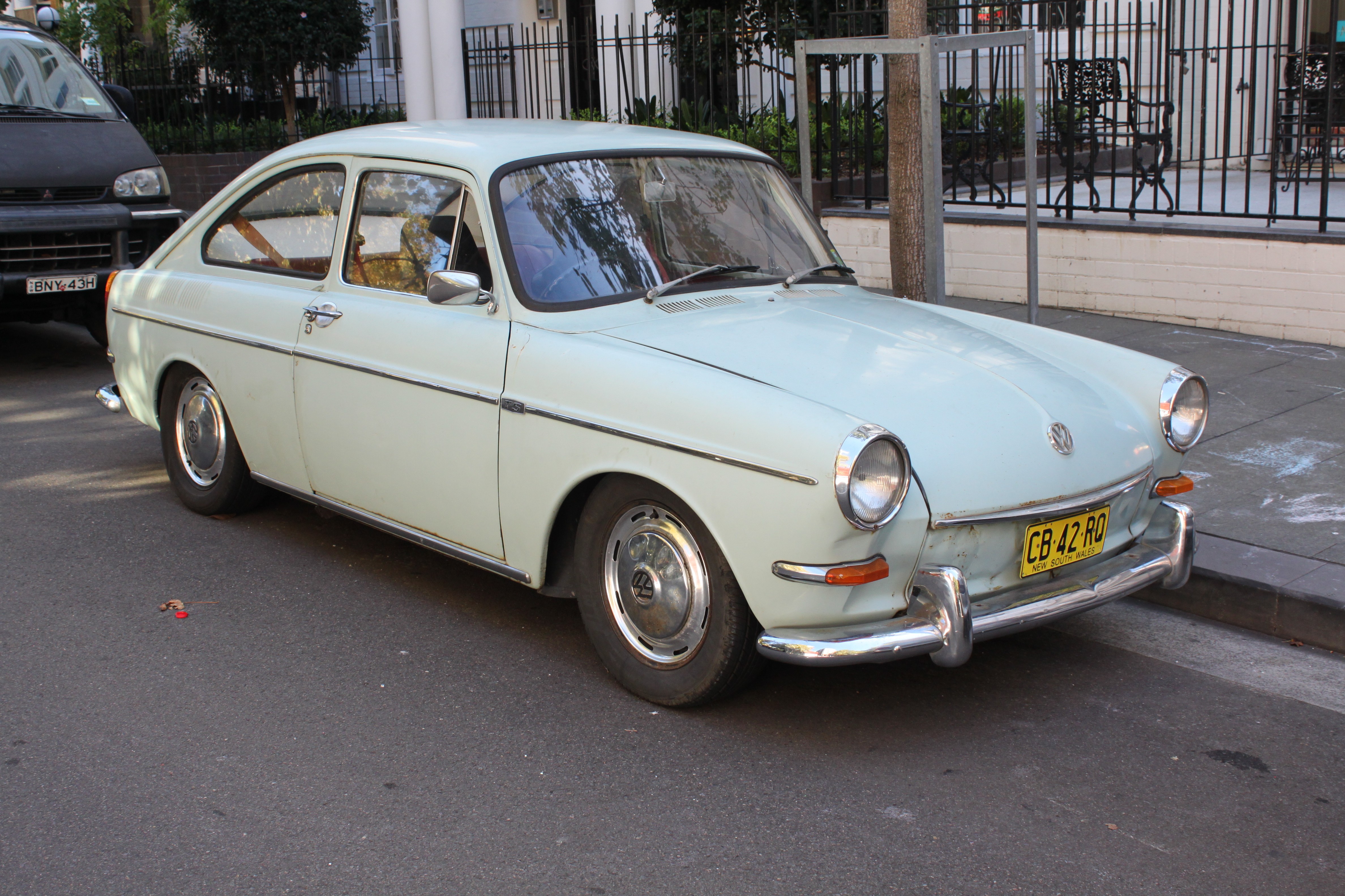 Volkswagen Type 3 1600 TL Fastback